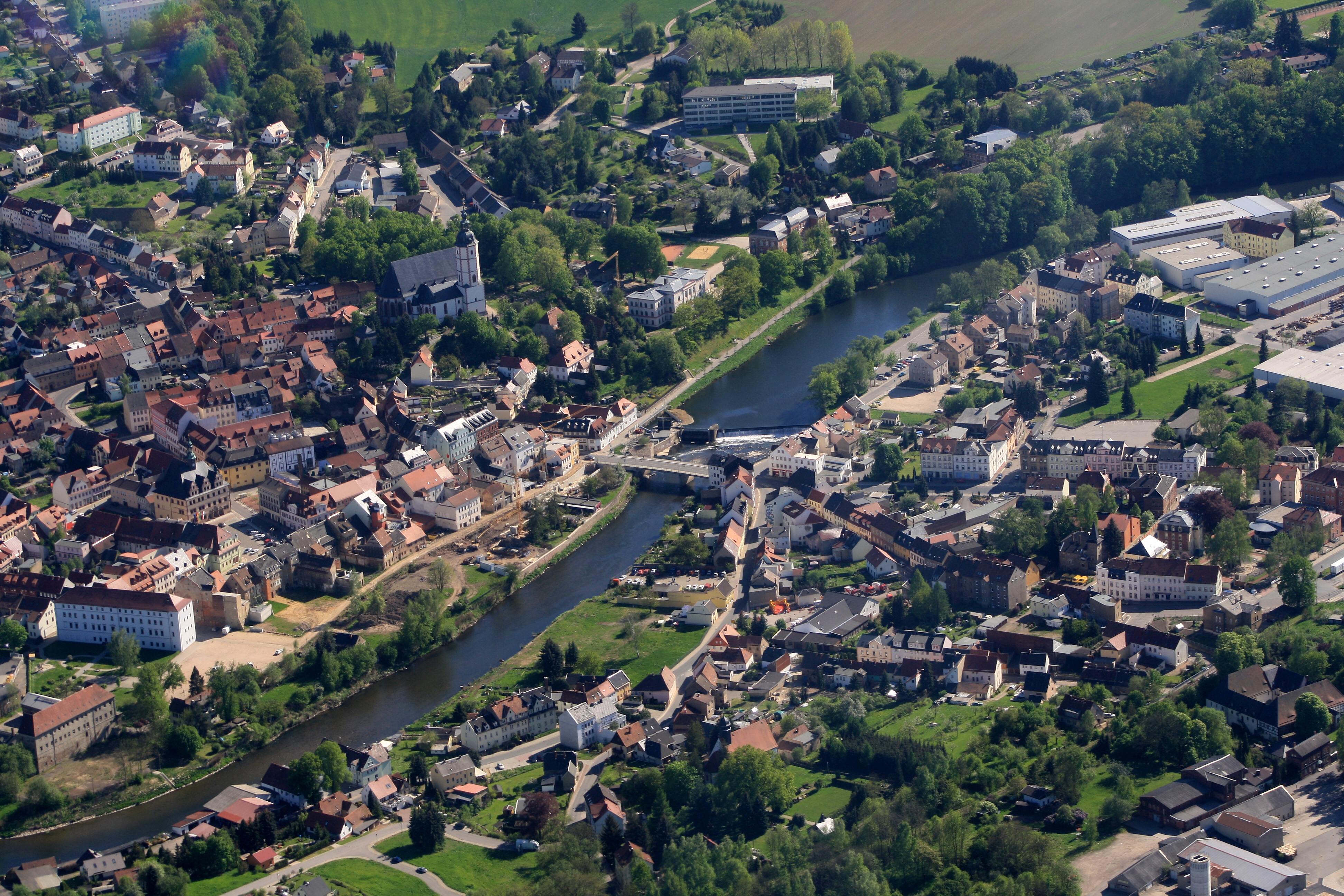 Luftaufnahme von Penig an der Zwickauer Mulde, Sachsen. Fluss im Landschaftsschutzgebiet „Mulden- und Chemnitztal“.